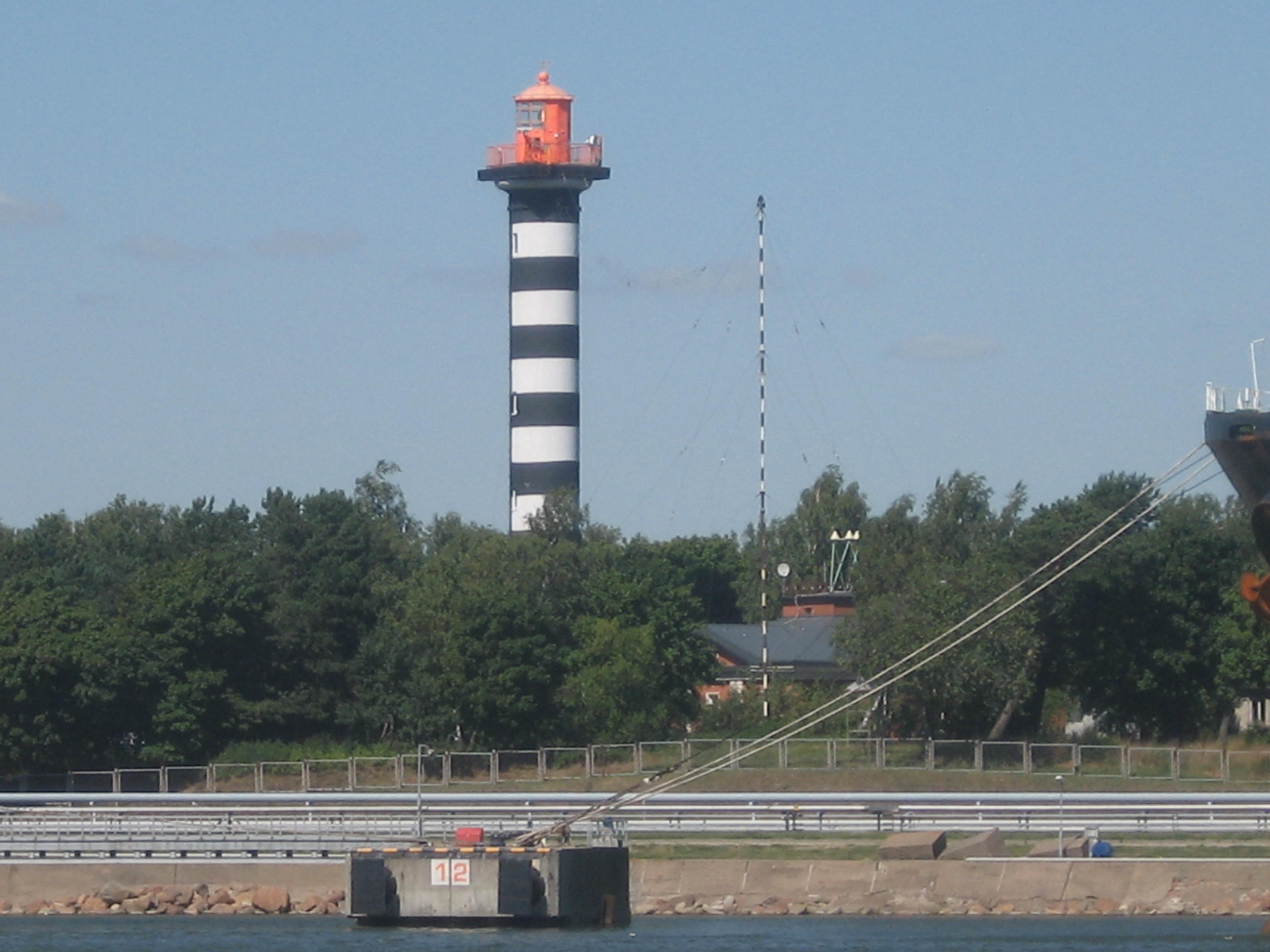 Klaipėdos švyturys